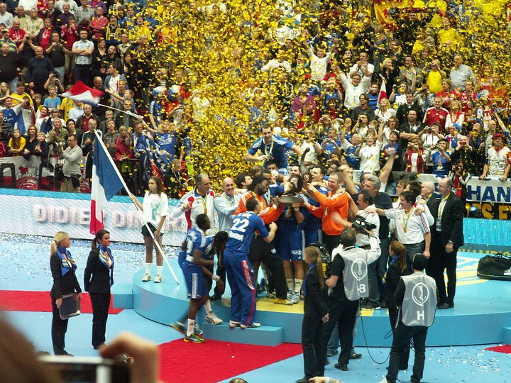 Francia celebra su cuarto título mundial